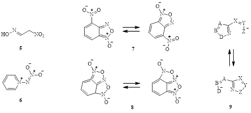 5. Метазоновая кислота, 6. Пиридин N-нитроимин, 7. Перегруппировка бензофураксанов, 8. Структура Бейли, Моноядерная перегруппировка (общее представление)